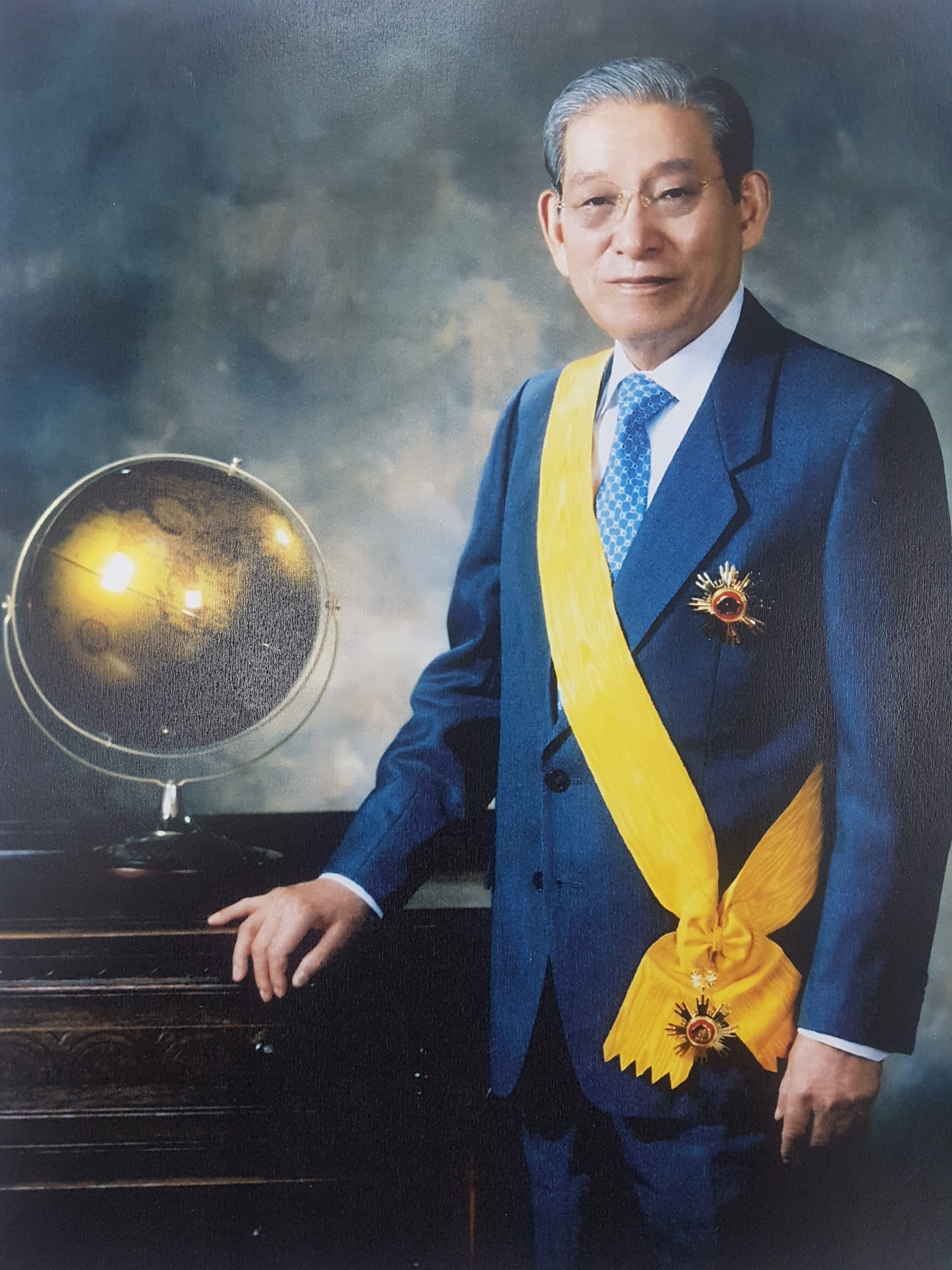 관정재단 사무실에 걸려있는 사진을 촬영함